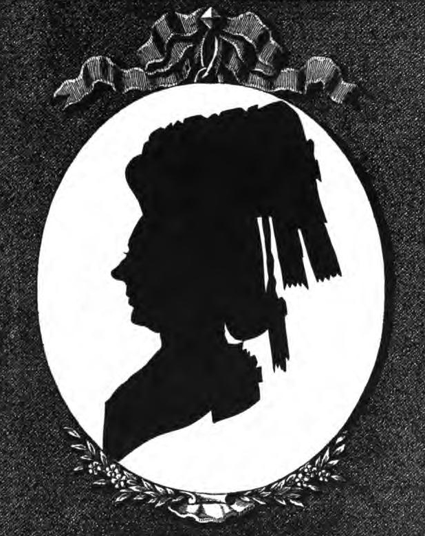 Княгиня Елизавета Карловна Путятина, ур. Сиверс (1746—1818), в первом браке за Я.Сиверсом, во втором за князем Н. А. Путятиным. Её внебрачная дочь от А. Вяземского, Екатерина Андреевна Колыванова (1780—1851) была замужем за Н. Карамзиным.